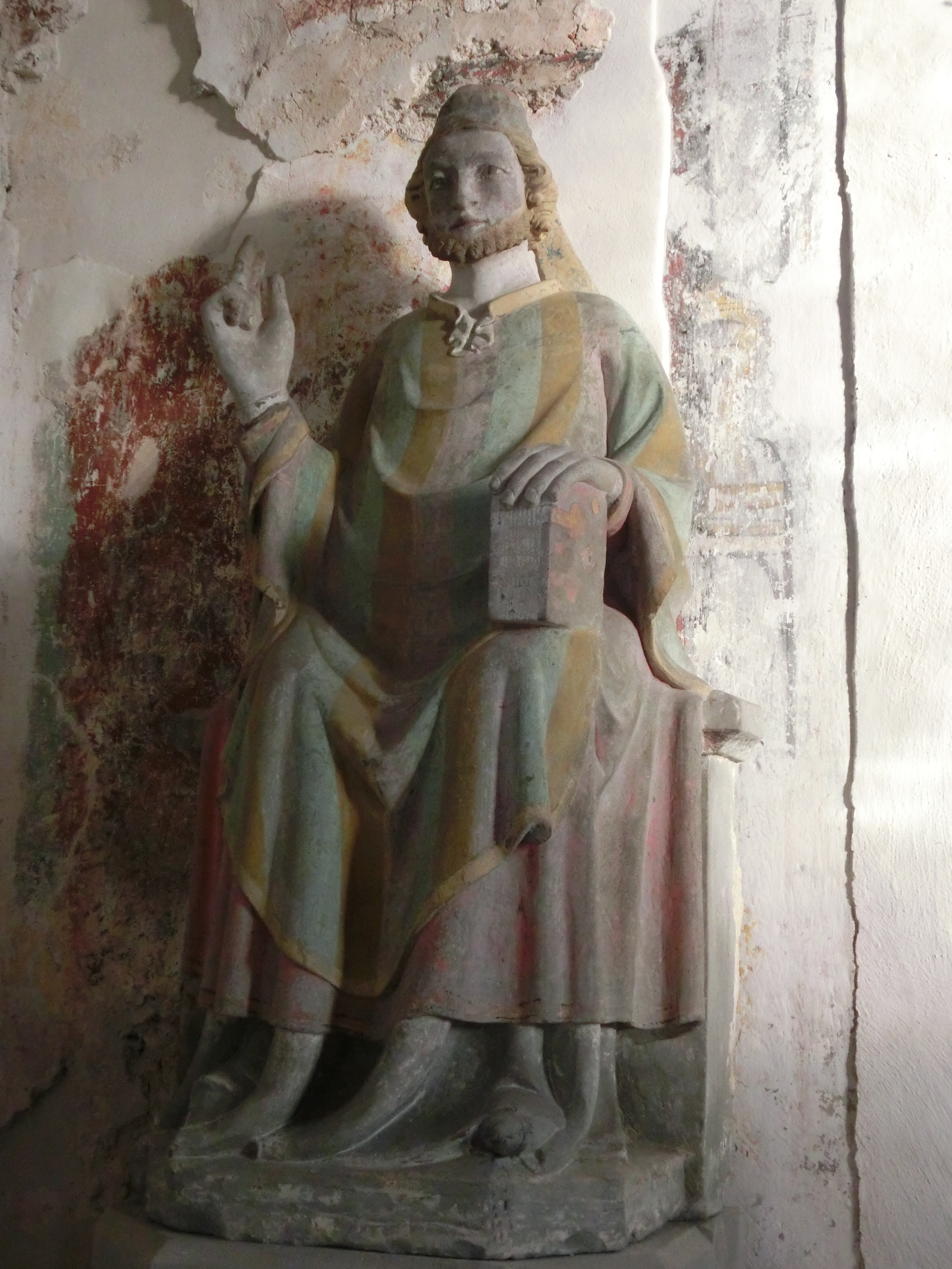 Deutschland - Baden-Württemberg - Bodenseekreis - Überlingen - Goldbach: Sylvesterkapelle